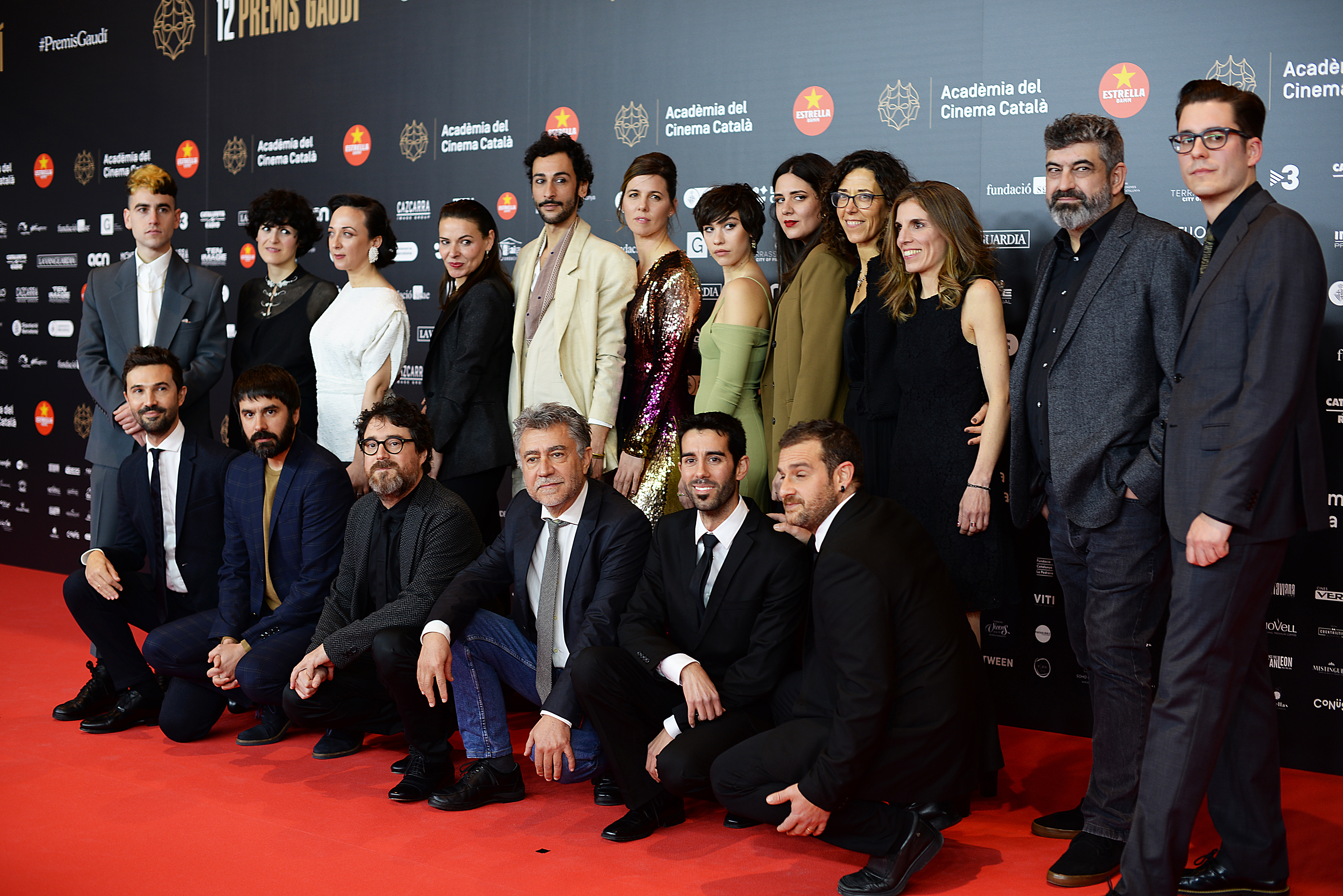 Equip de La hija de un ladrón, XII Premis Gaudí (2020)